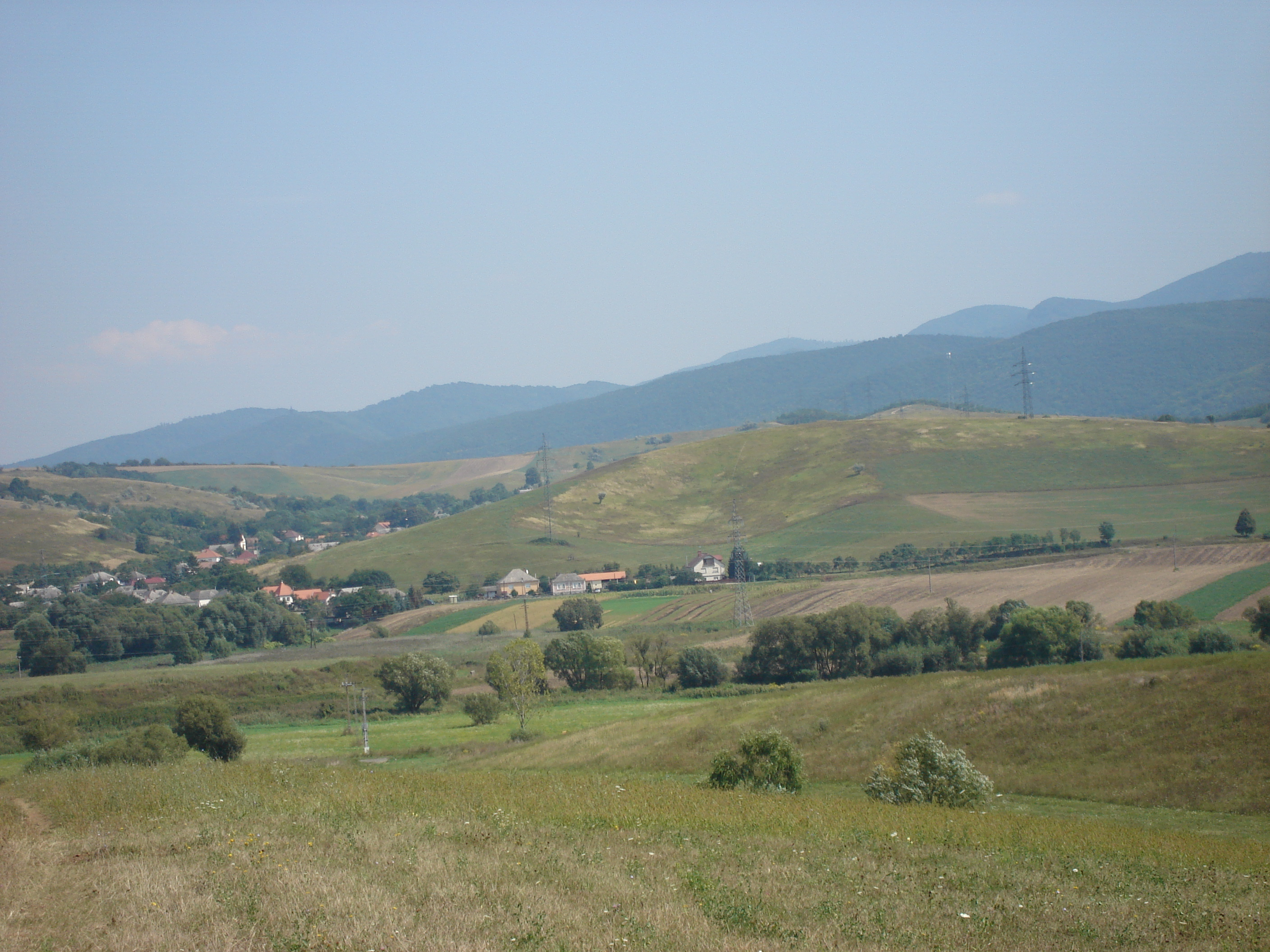 Bükkszentmárton